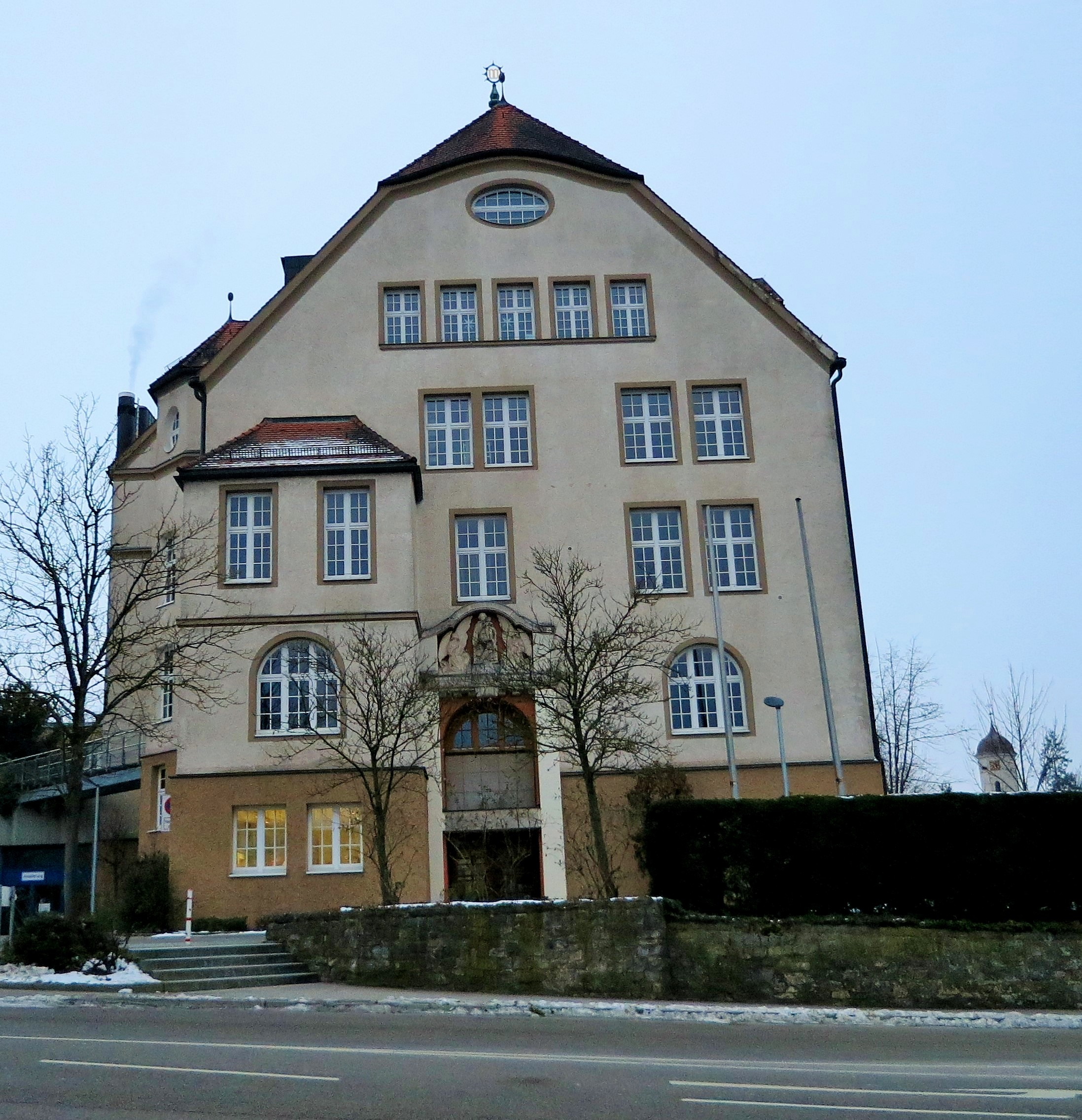 Hauptgebäude der Rettungsanstalt